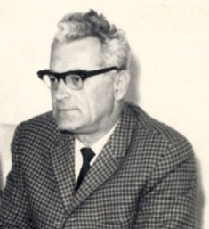 Redžo Mulić.